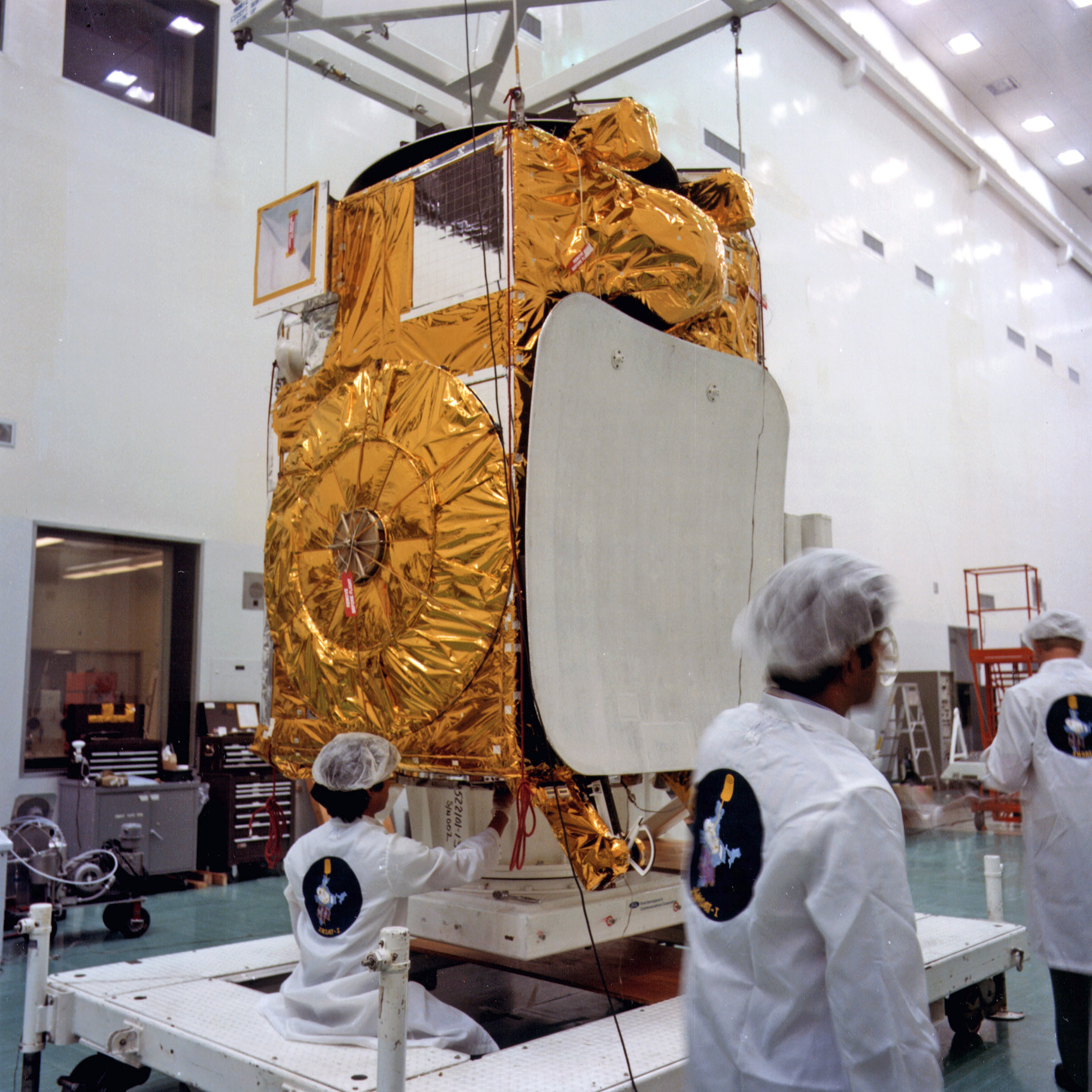 Documentary INSAT 1B spacecraft STS-8 cargo, HGR. AO.